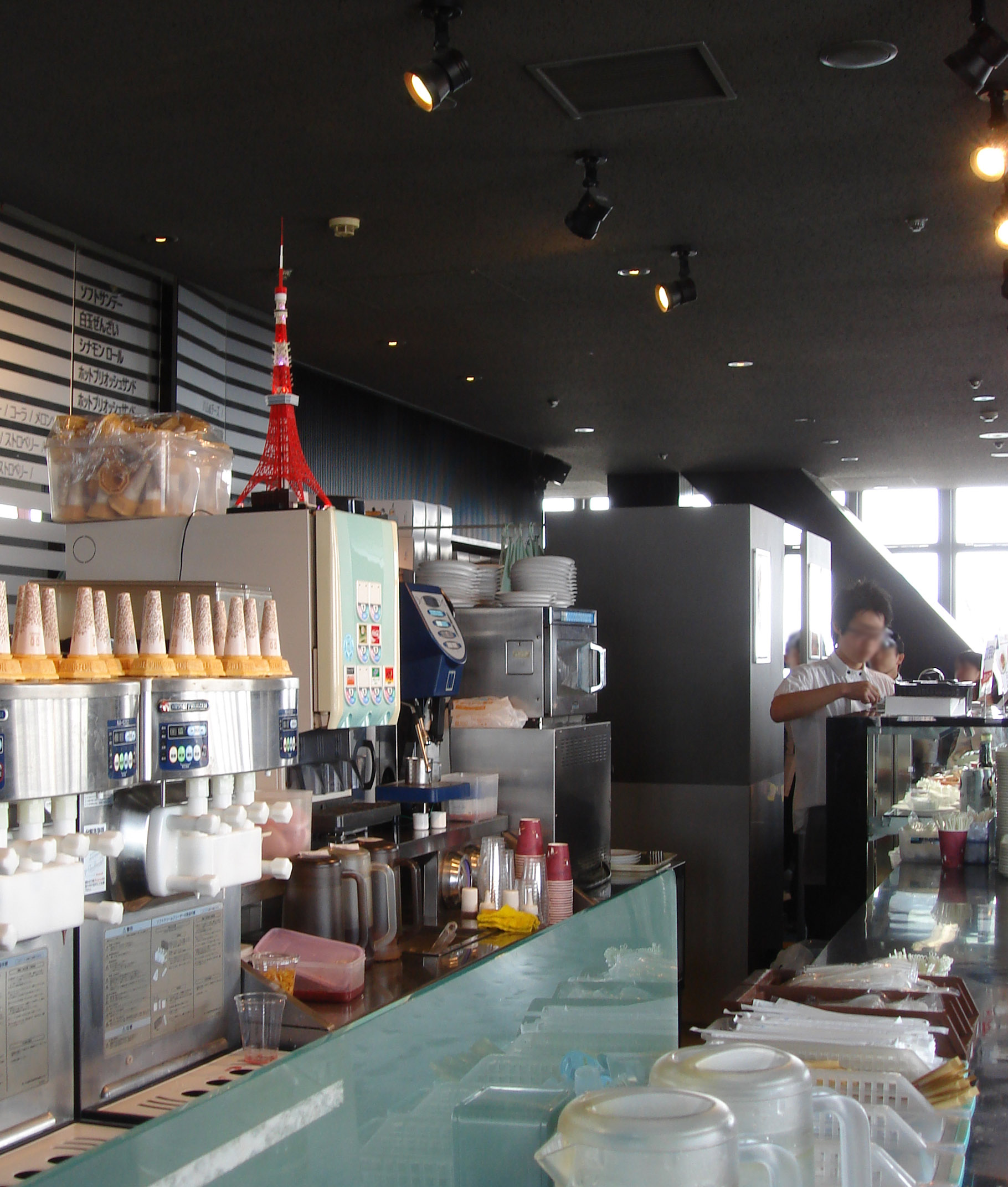 東京タワー大展望台1階にあるカフェと、タワーのフィギュア